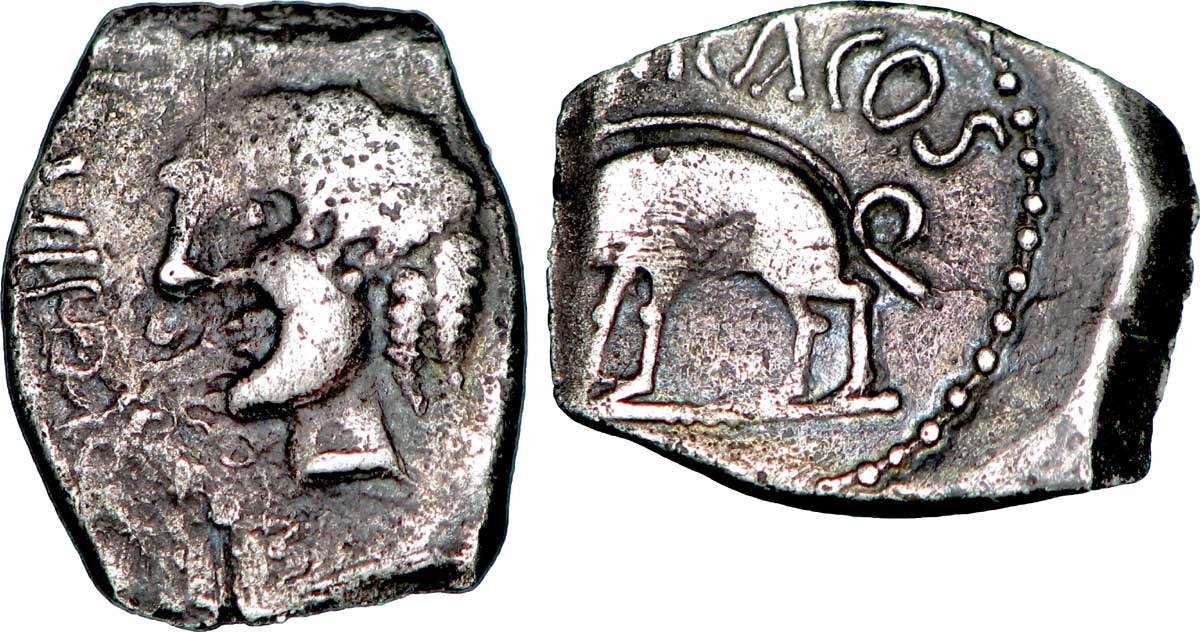 Drachme « au sanglier » frappée par les Rutènes. Date : IIe-Ier siècle av. J.-C.